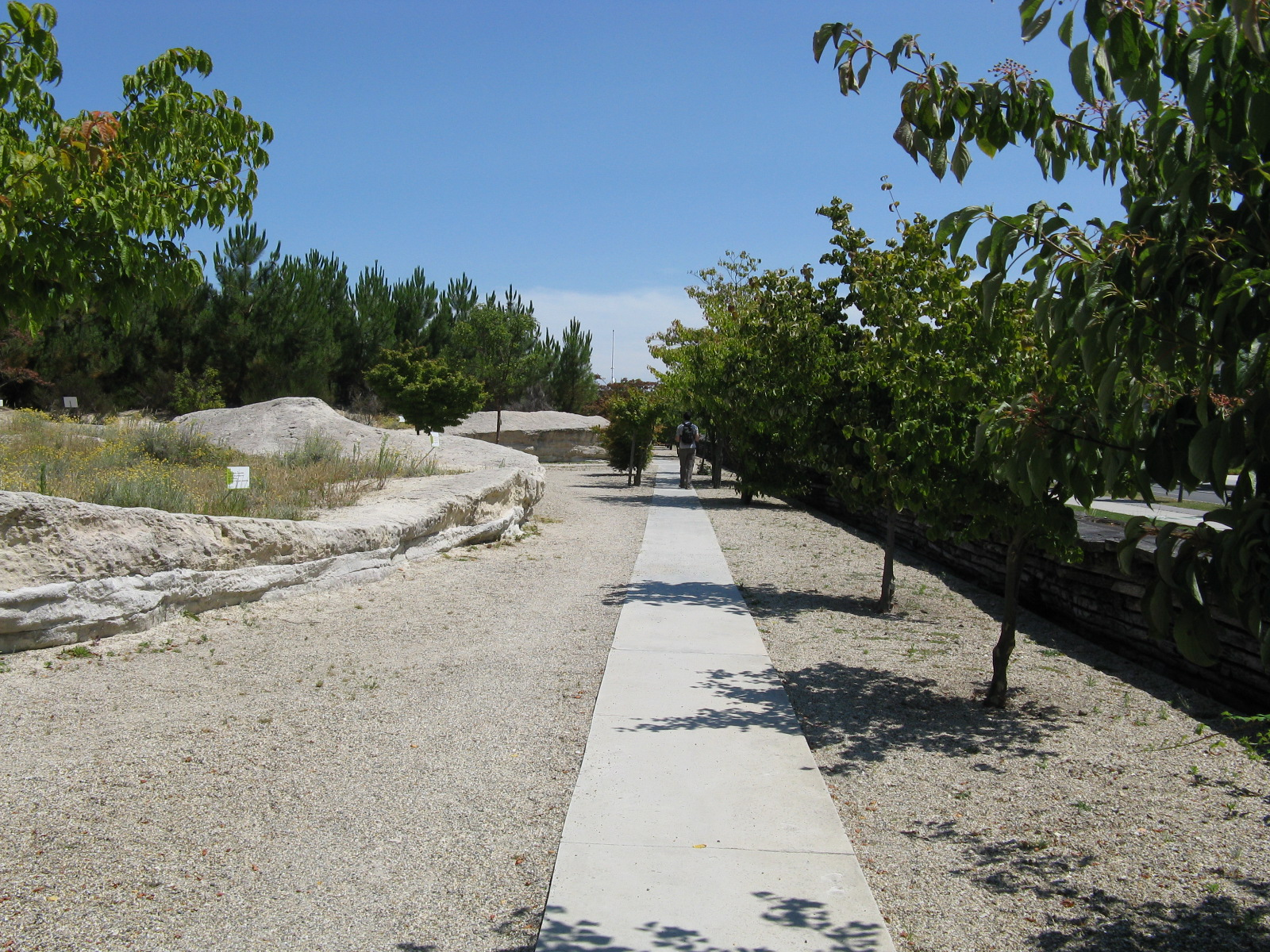 Bordeaux: Jardin Botanique 16